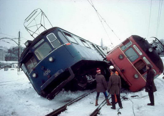 Brutalt møte mellom Kolsåsbanen og Holmenkollbanen ved Frøen, 1980